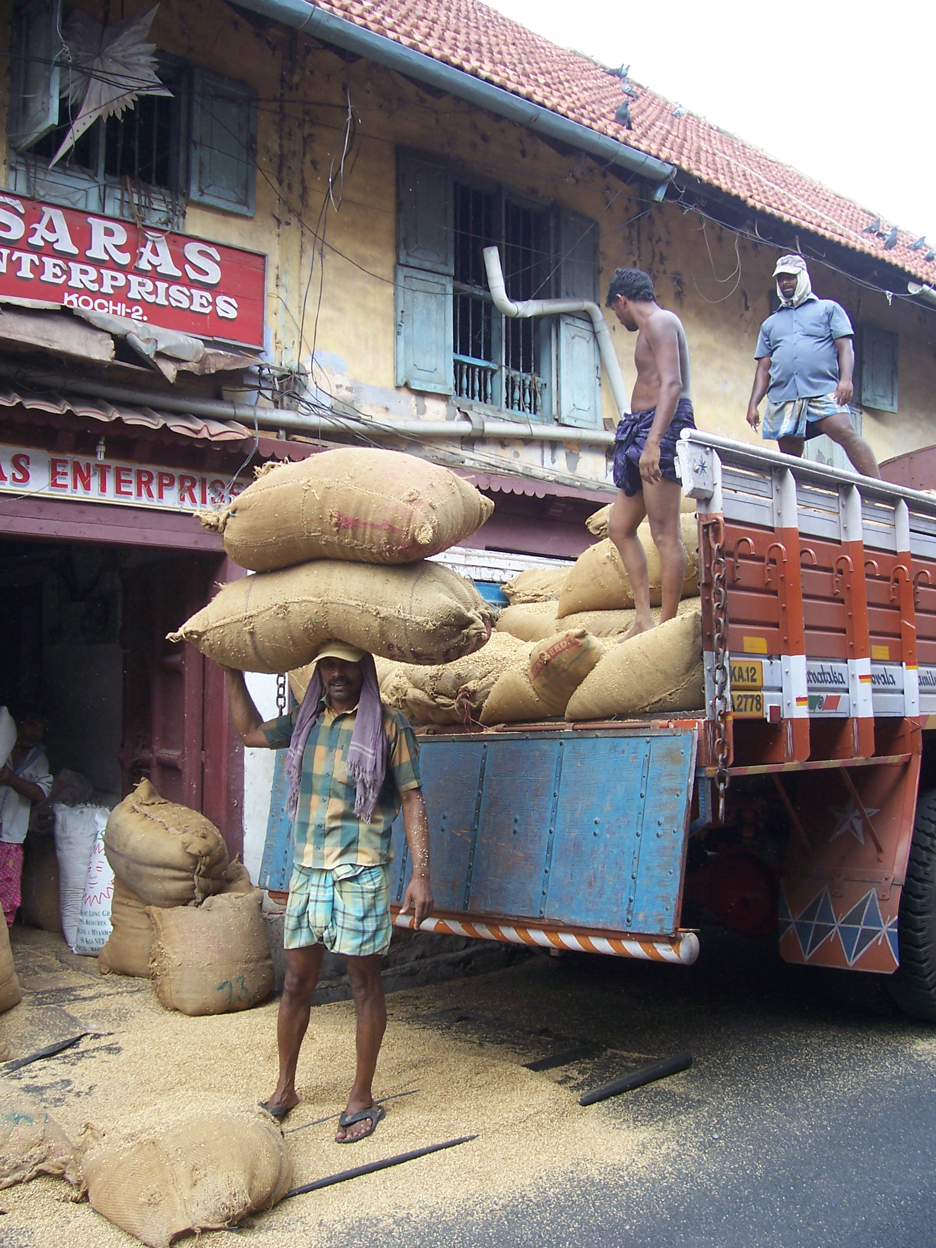 Porteur de sacs de riz à Cochin